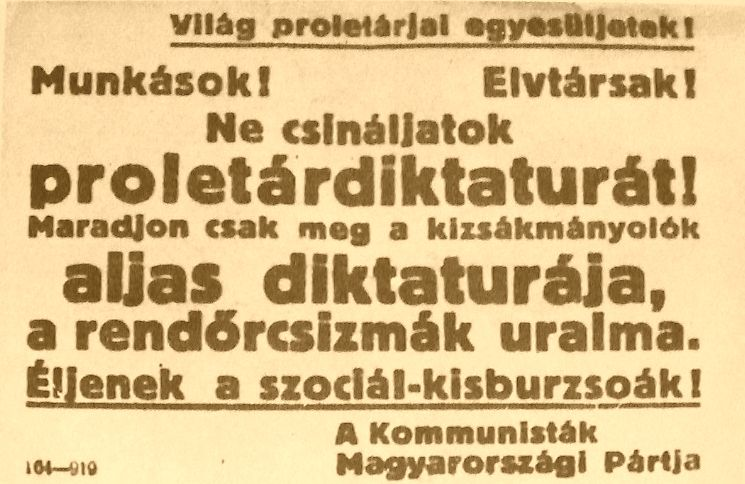 „A fiatal KMP éles harcot indít a jobboldali szociáldemokraták ellen. (Gunyoros hangú röpcédula) – 1918. dec.”